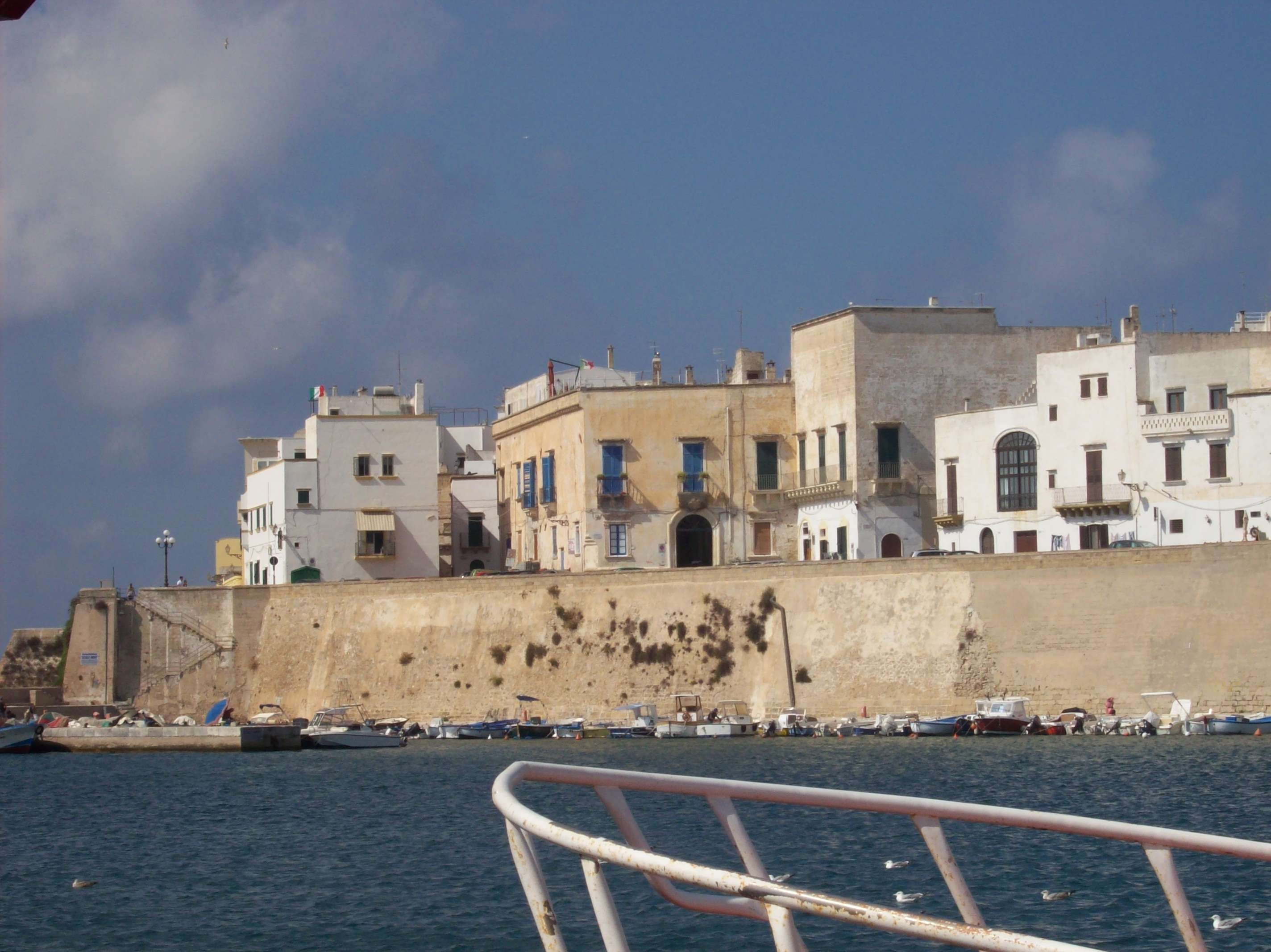 Gallipoli